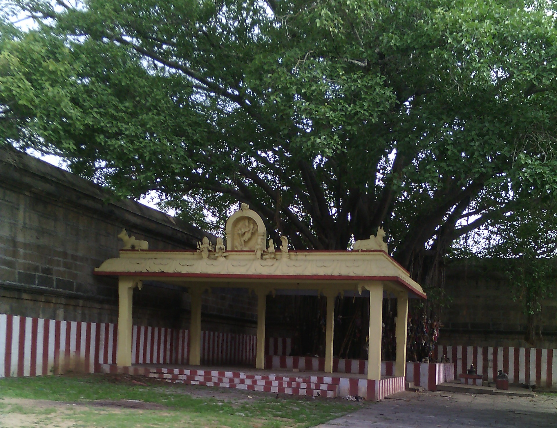 திருவாலங்காடு வடாரண்யேசுவரர் கோயில் ஆலமரம்